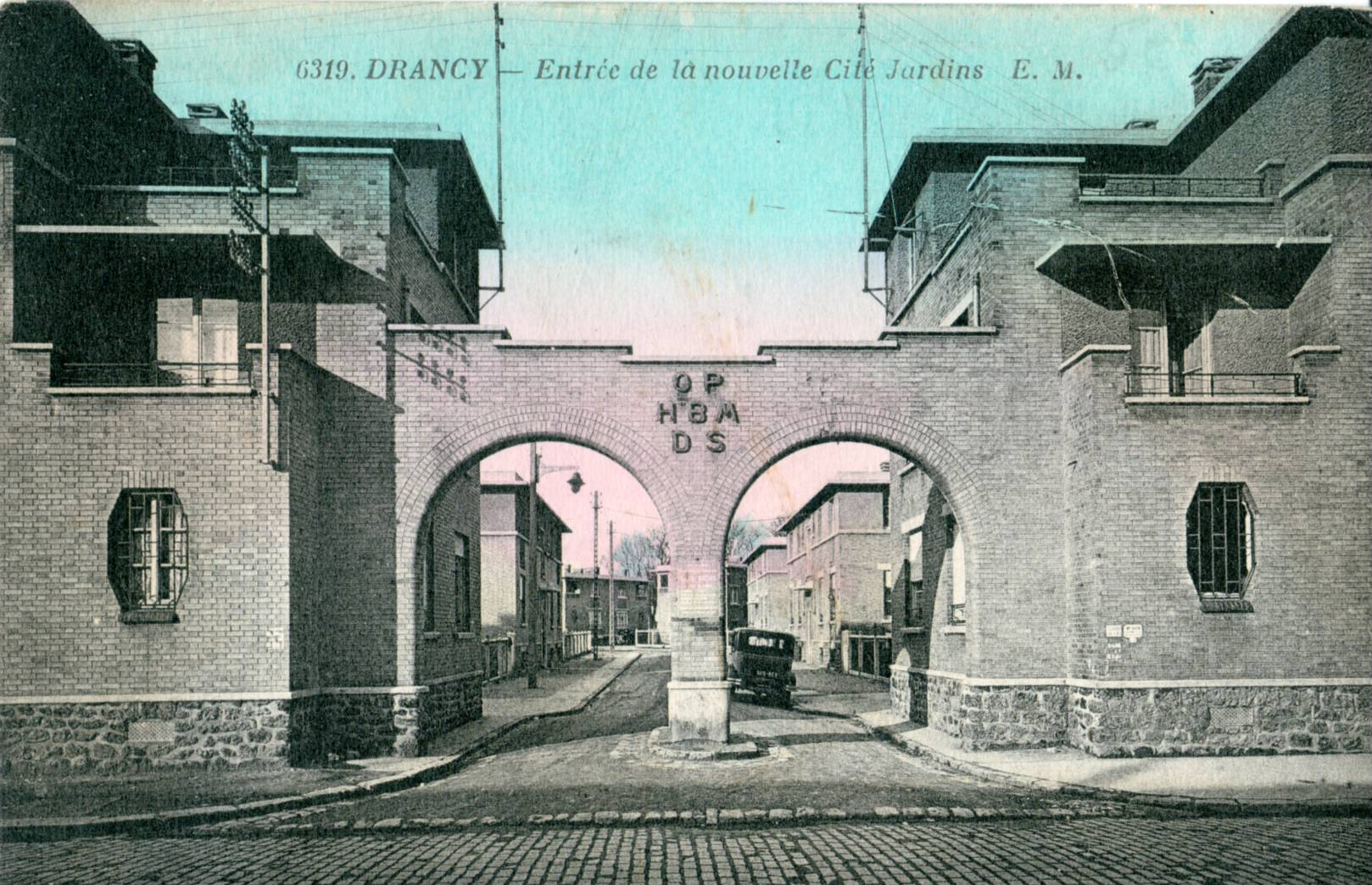 Carte postale ancienne éditée par EM N° 6319 DRANCY : Entrée de la nouvelle Cité-Jardins (Construite en 1921-1929 par par les architectes Bassompierre et de Rutte pour l'Office public des HBM du département de la Seine)